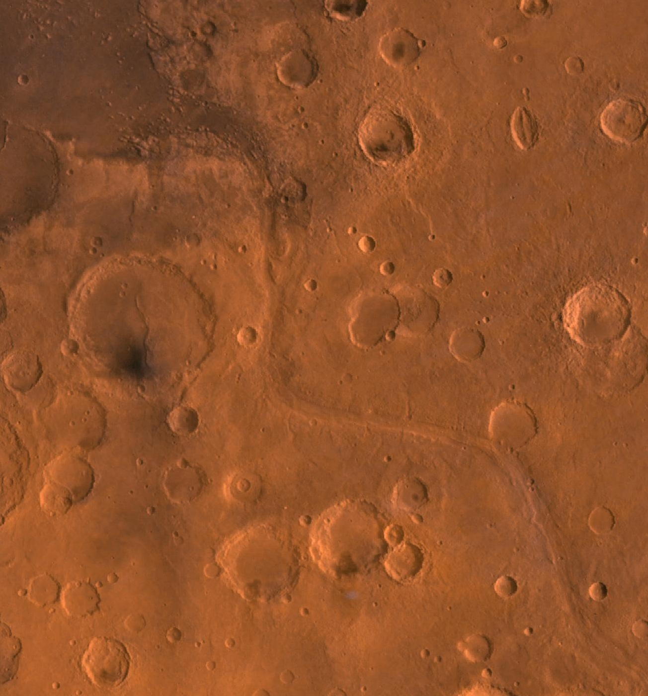 Zoom sur la formation de Mawrth Vallis sur la planète Mars. Photo de Viking Orbiter 1.